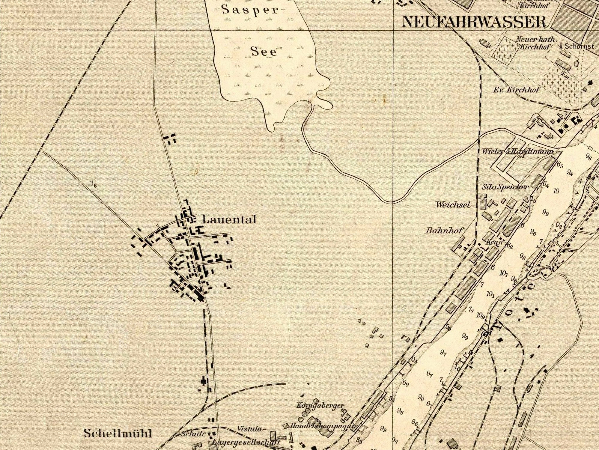 Danzig Lauental.